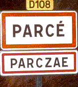 Panneau routier bilingue français-gallo